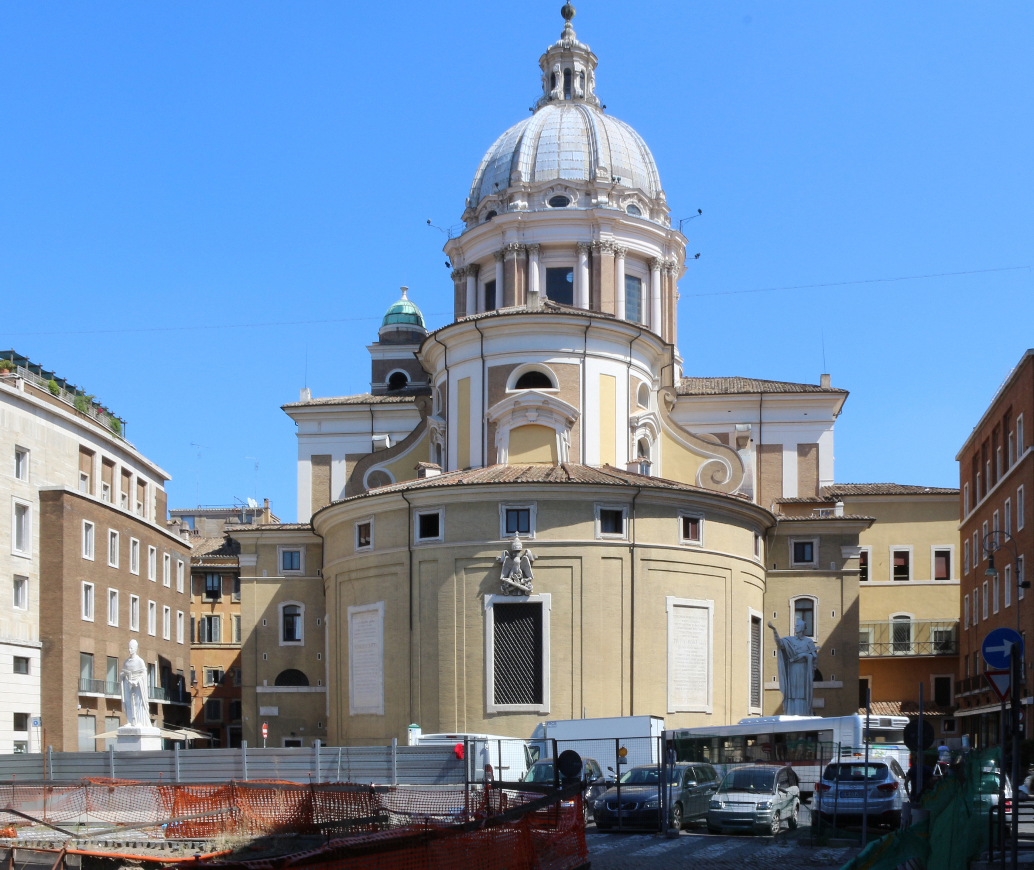 San Carlo al Corso, abside verso il mausoleo di Augusto.